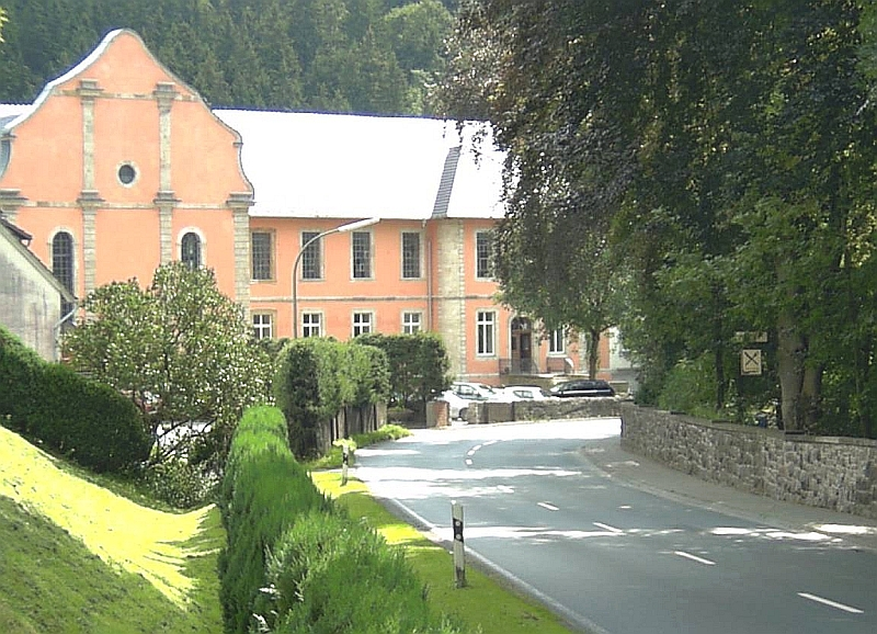 Kloster Bredelar, Marsberg, Germany.